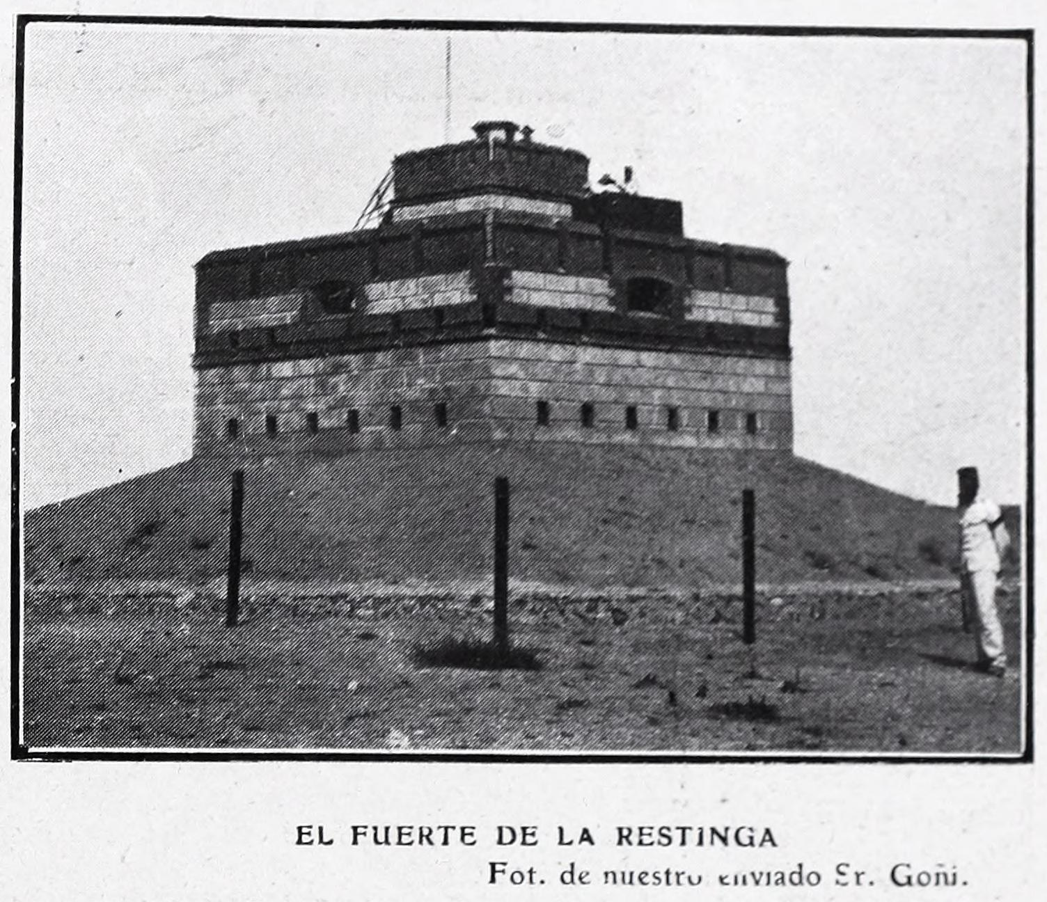 El Fuerte de la Restinga.Foto de nuestro enviado Sr. Goñi